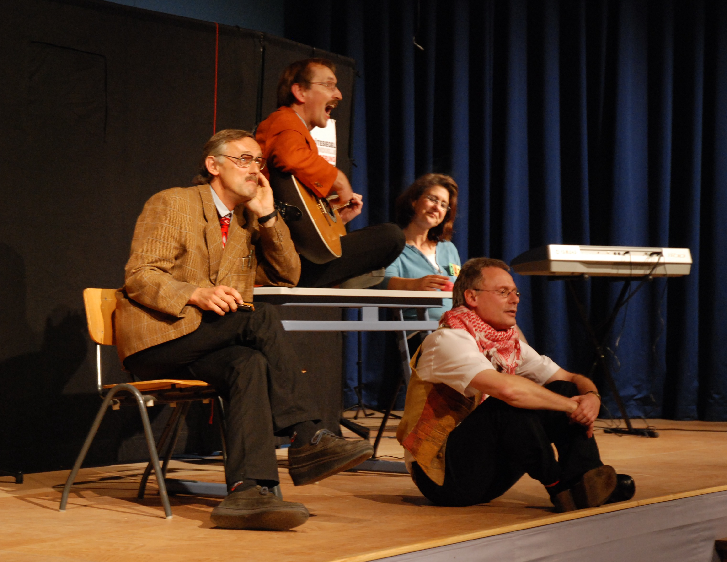 Die Lehrerkabarettgruppe "Die Daktiker" bei einem Auftritt in der Aula des Schulzentrums Wenden im Sauerland im September 2007